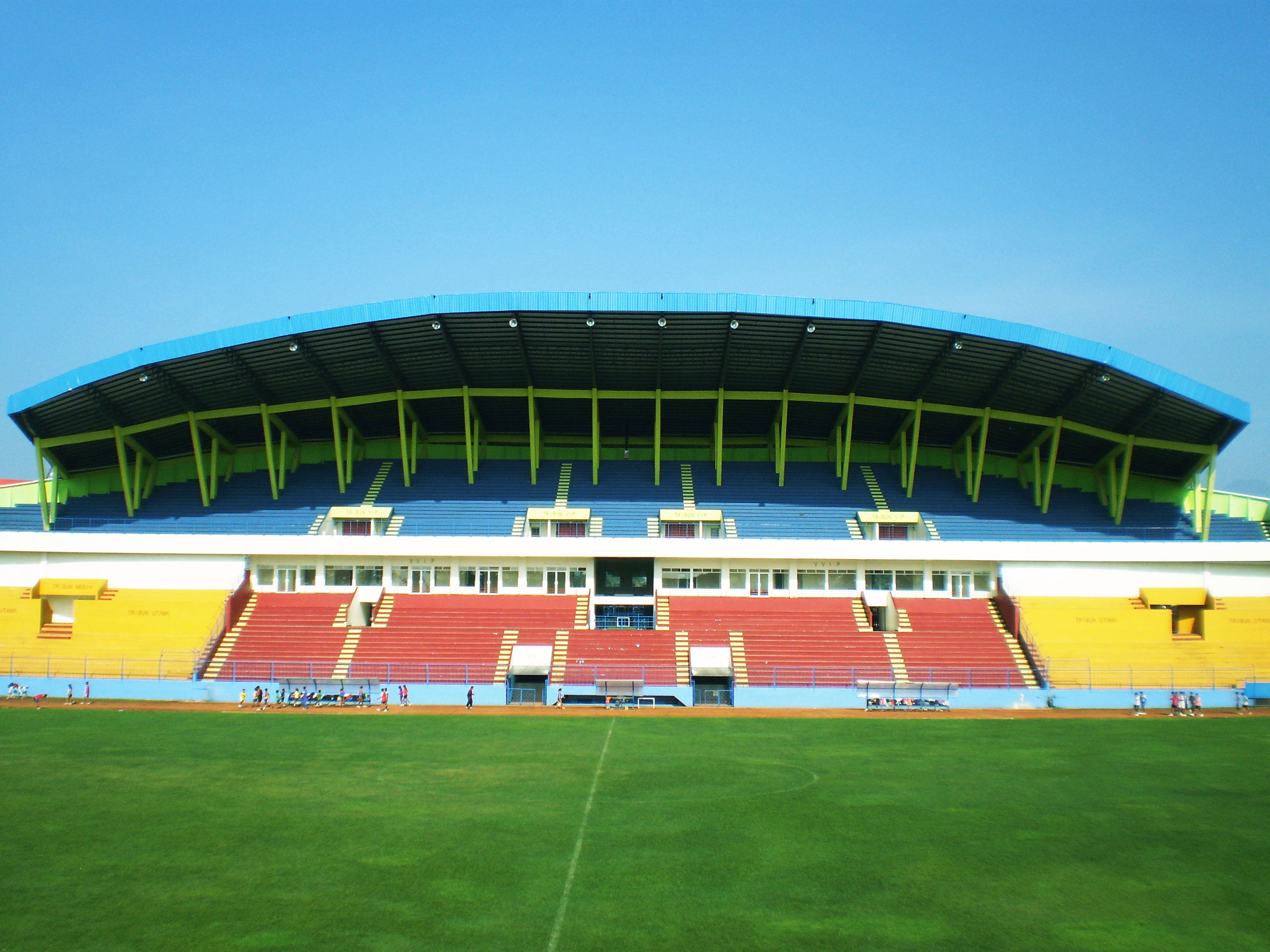 Gajayana Stadium, Malang